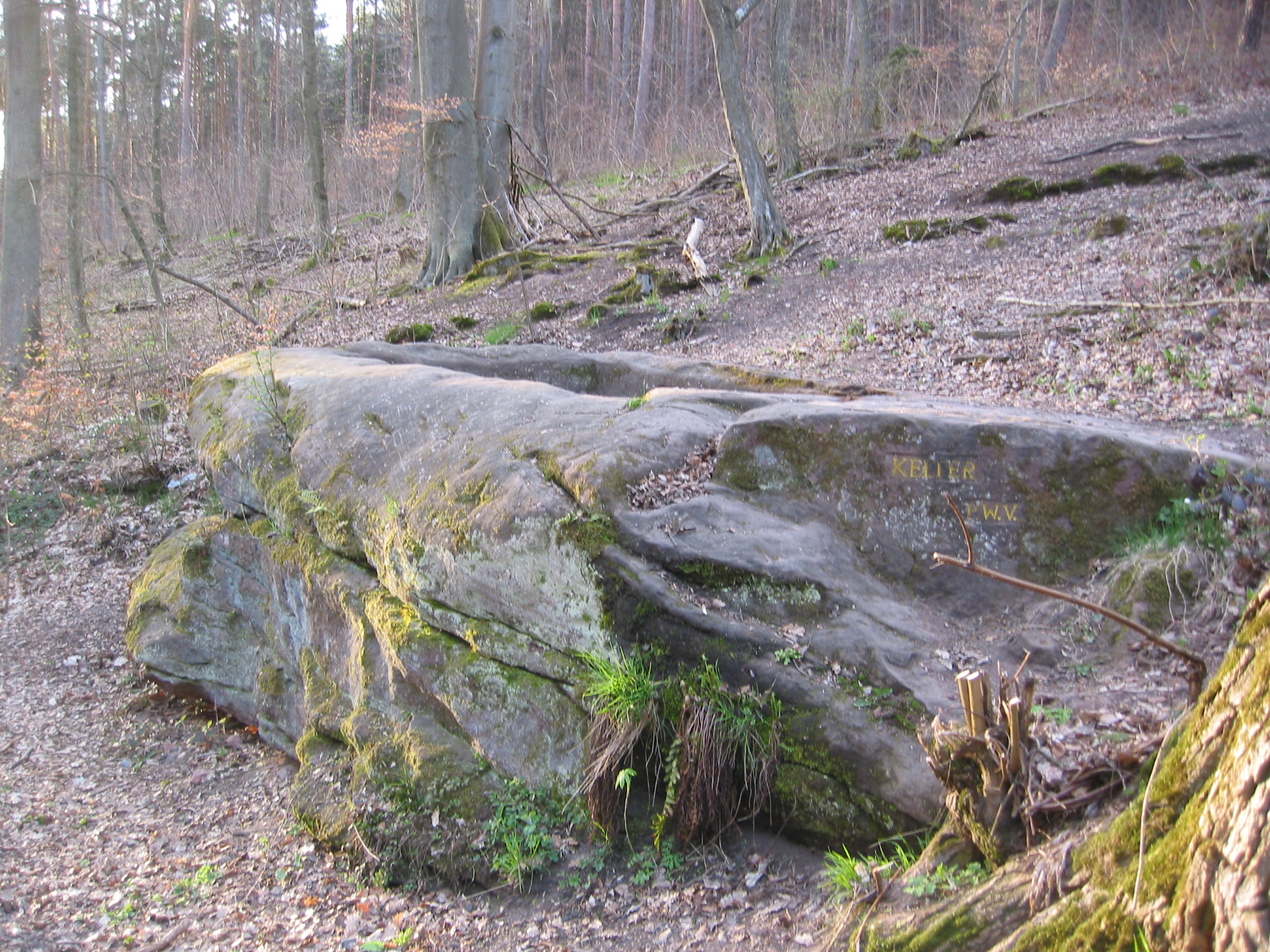 Ritterstein Nummer 273. Kelter.